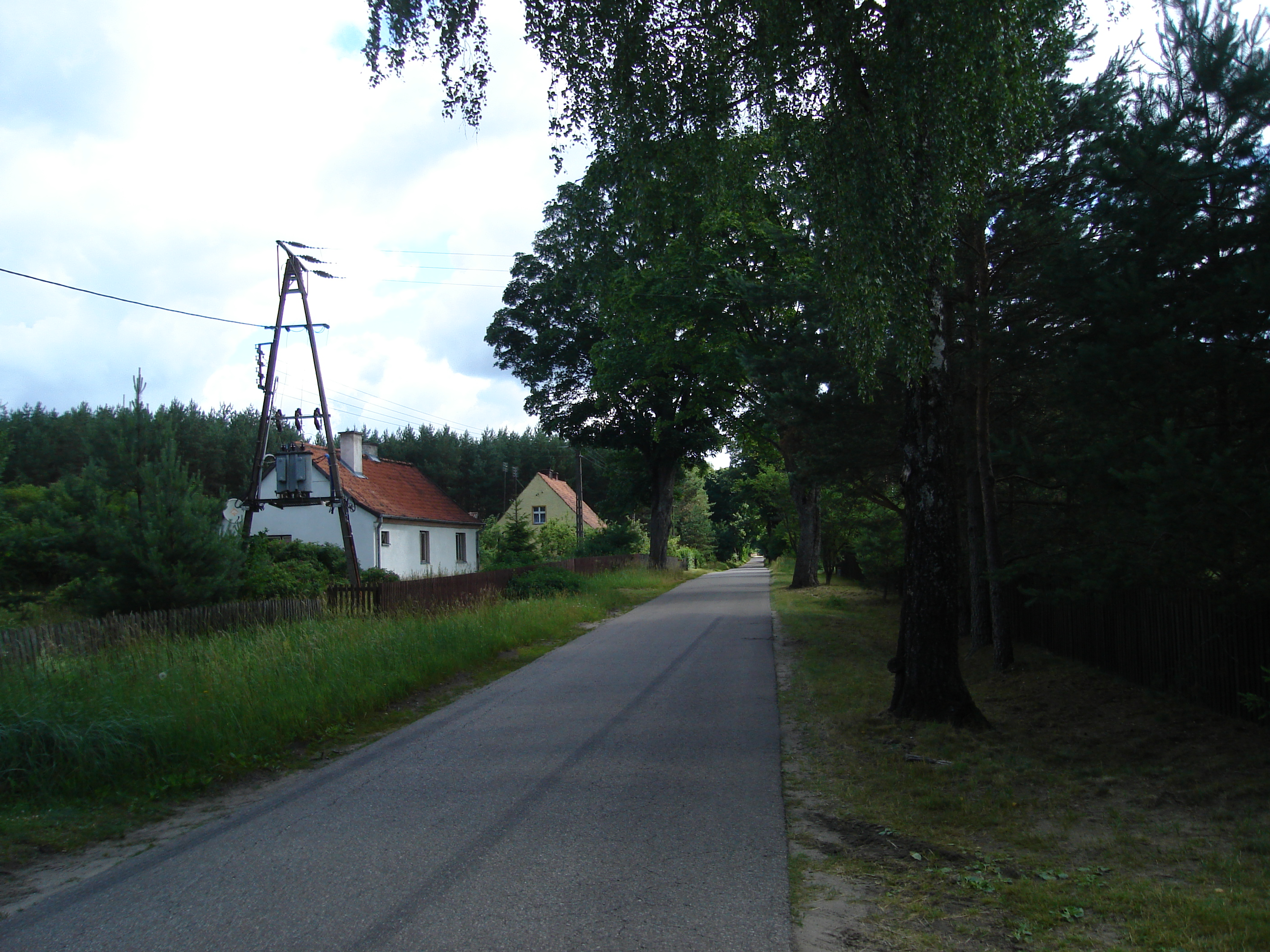 Wieś Karwica